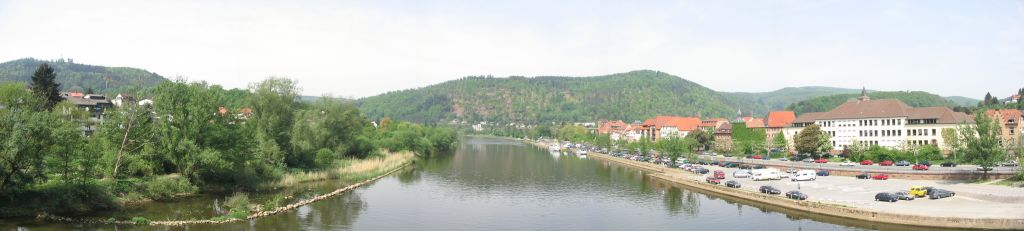 Panoramaaufnahme von Eberbach